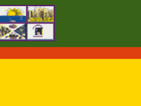 Bandera del municipio José Ángel Lamas del estado Aragua, Venezuela